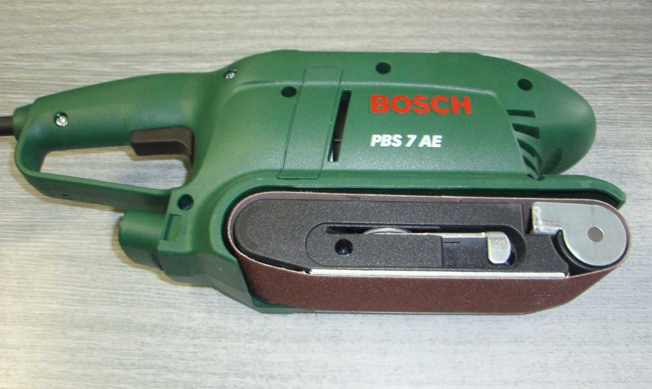 Bosch Belt Sander PBS 7 AE